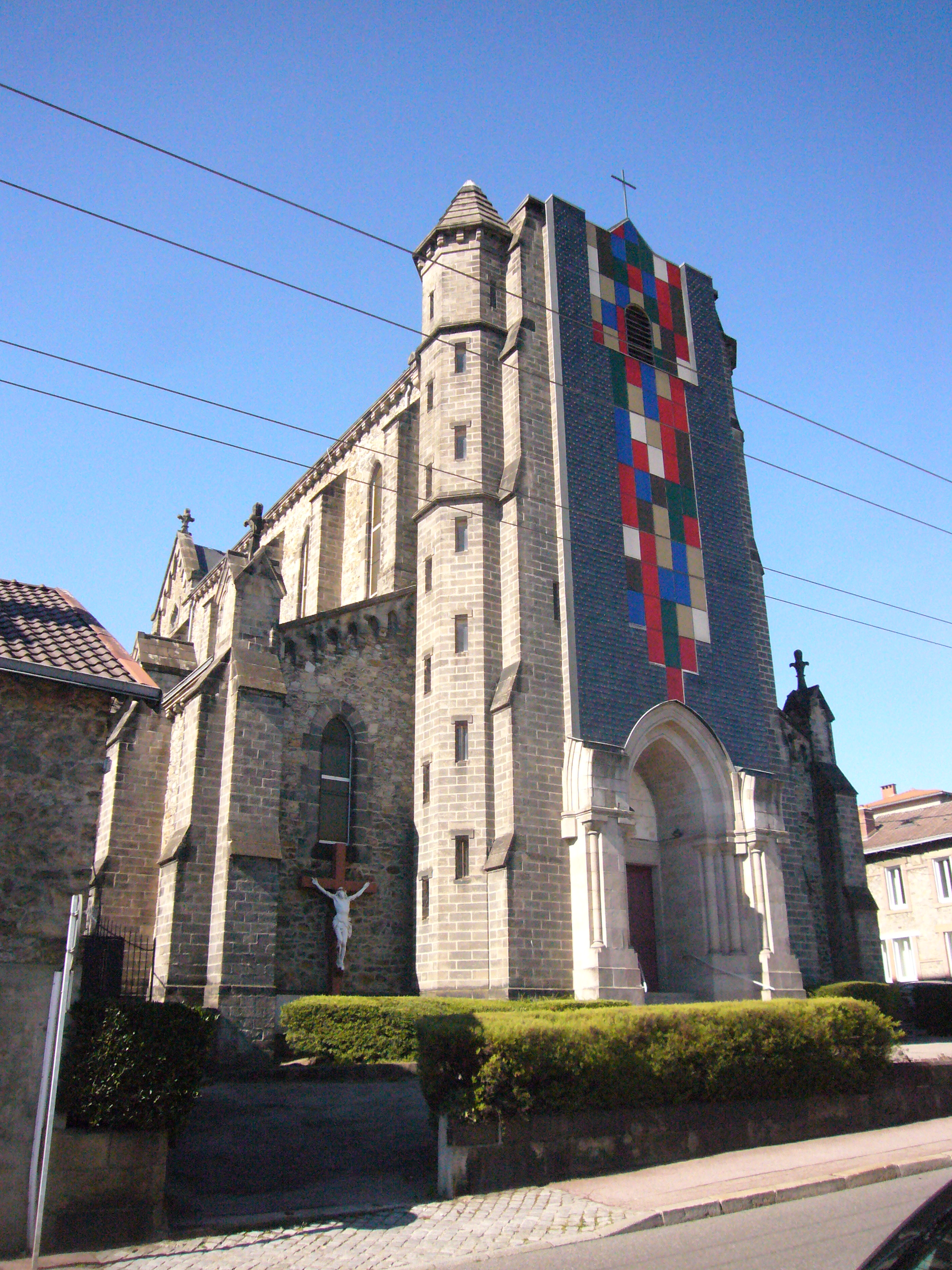 L'église Saint-Paul Saint-Louis de Limoges (Haute-Vienne, France), ouverte en 1907.